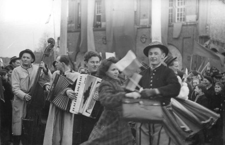 Zentralbild-Illus-Heilig 27.1.51 Kno-Leu. Abschlussprotokoll über die Oder-Neiße Grenze unterzeichnet. Am 27. Januar 1951 unterzeichneten der Leiter des polnischen Aussenministeriums Skrzeszweski und Aussenminister in Frankfurt-Oder das Abschlussprotokoll der Grenzmarkierung der Oder-Neiße-Friedensgrenze. Damit ist die Friedensgrenze zwischen der Republik Polen und der DDR endgülitg festgelegt. UBz: Eine polnische Trachtengruppe bei fröhlichem Tanz auf dem Marktplatz in Frankfurt-Oder.